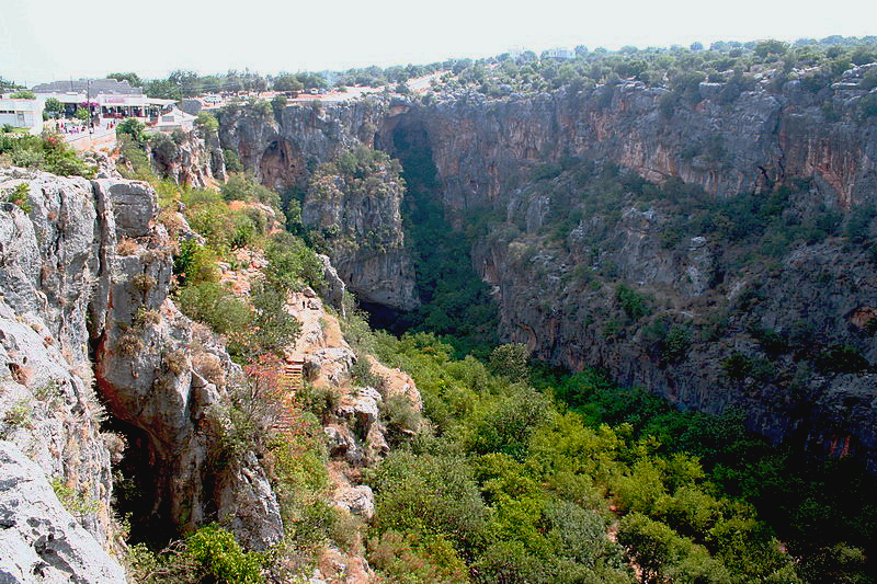 Cennet Obruğu, Mersin